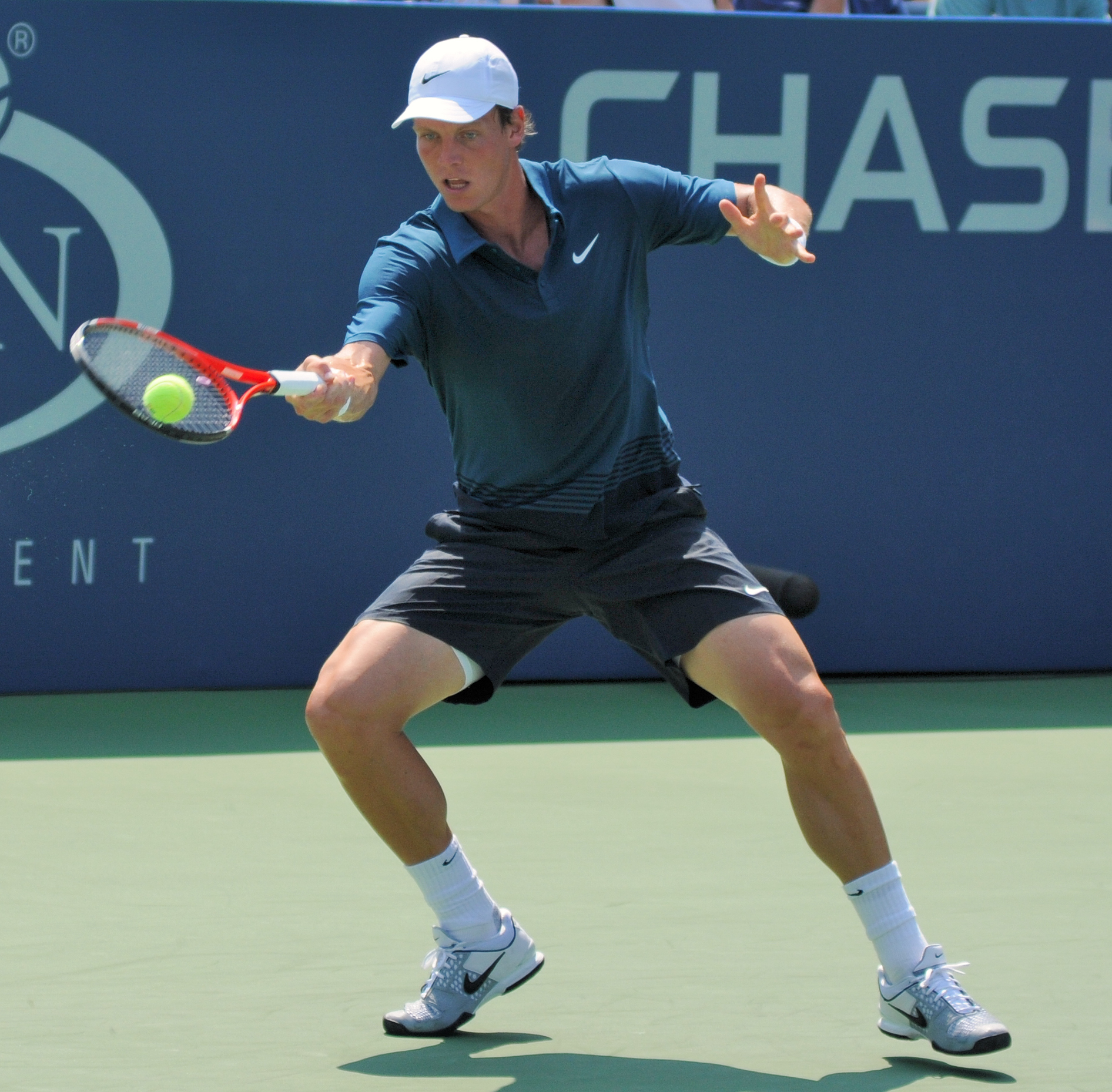 Tomas Berdych - US Open 2010